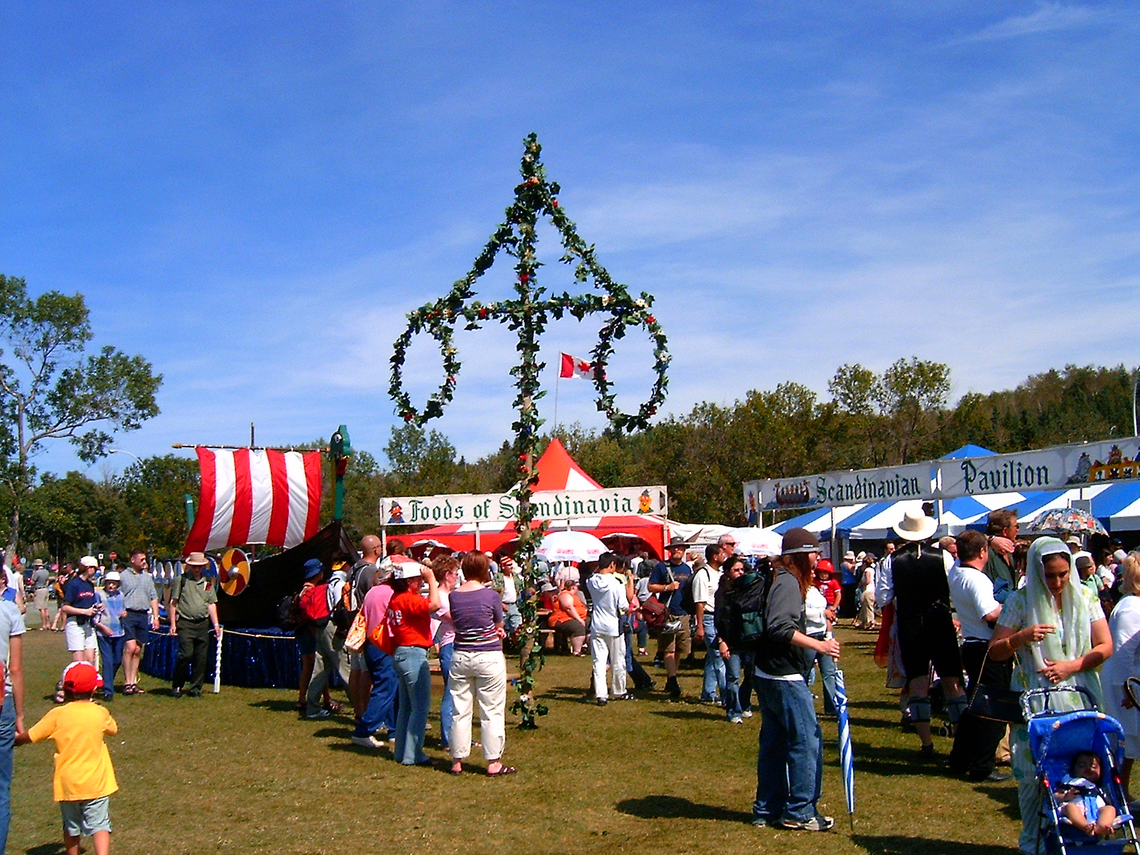 Photo G Larson